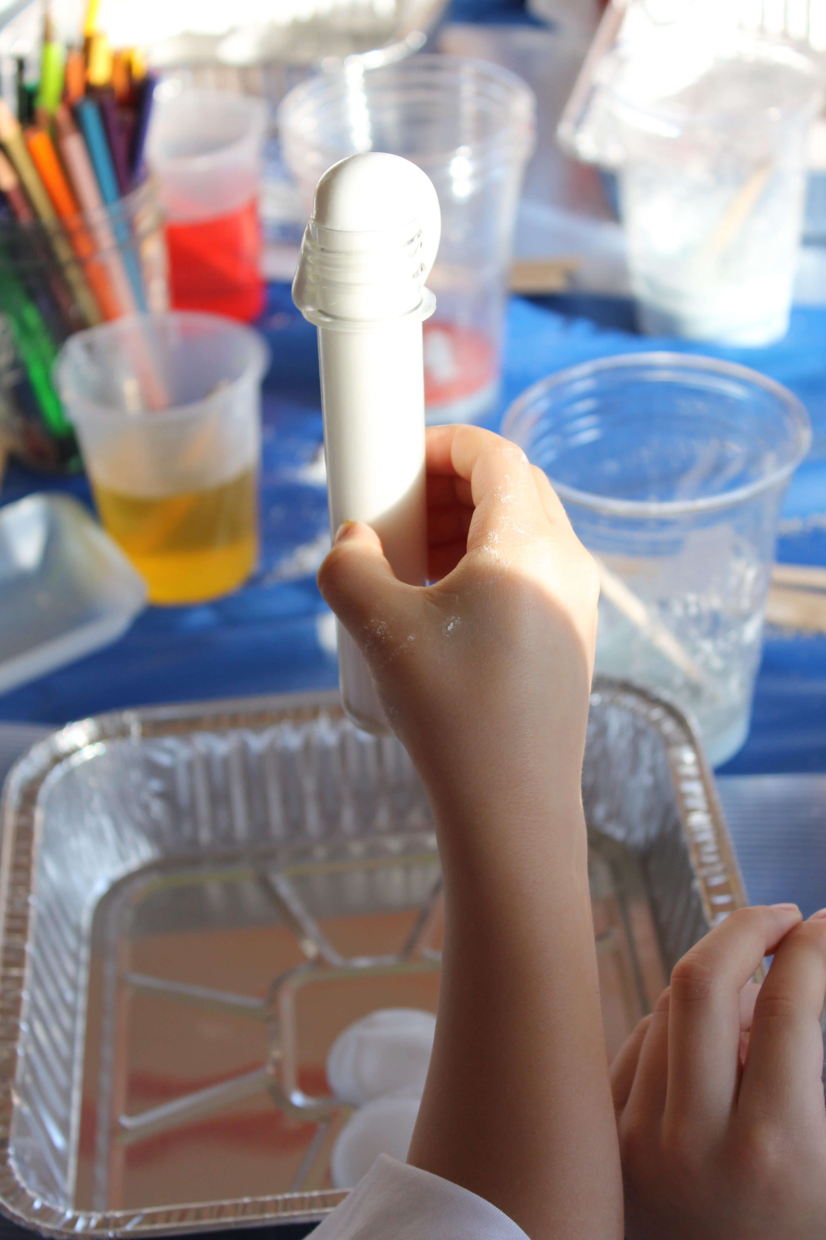 Dentífrico de elefante